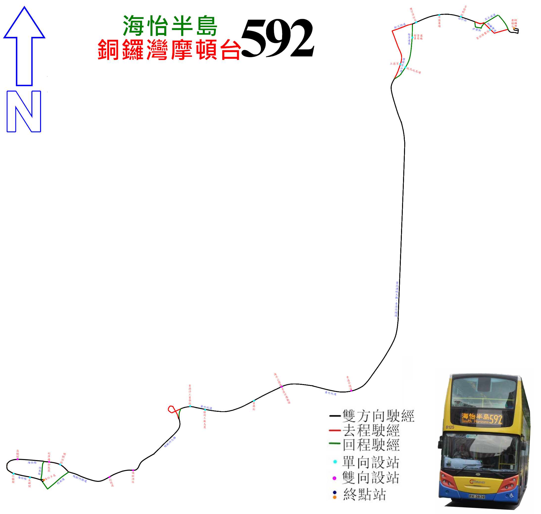 中文（香港）: 城巴592線的走線圖